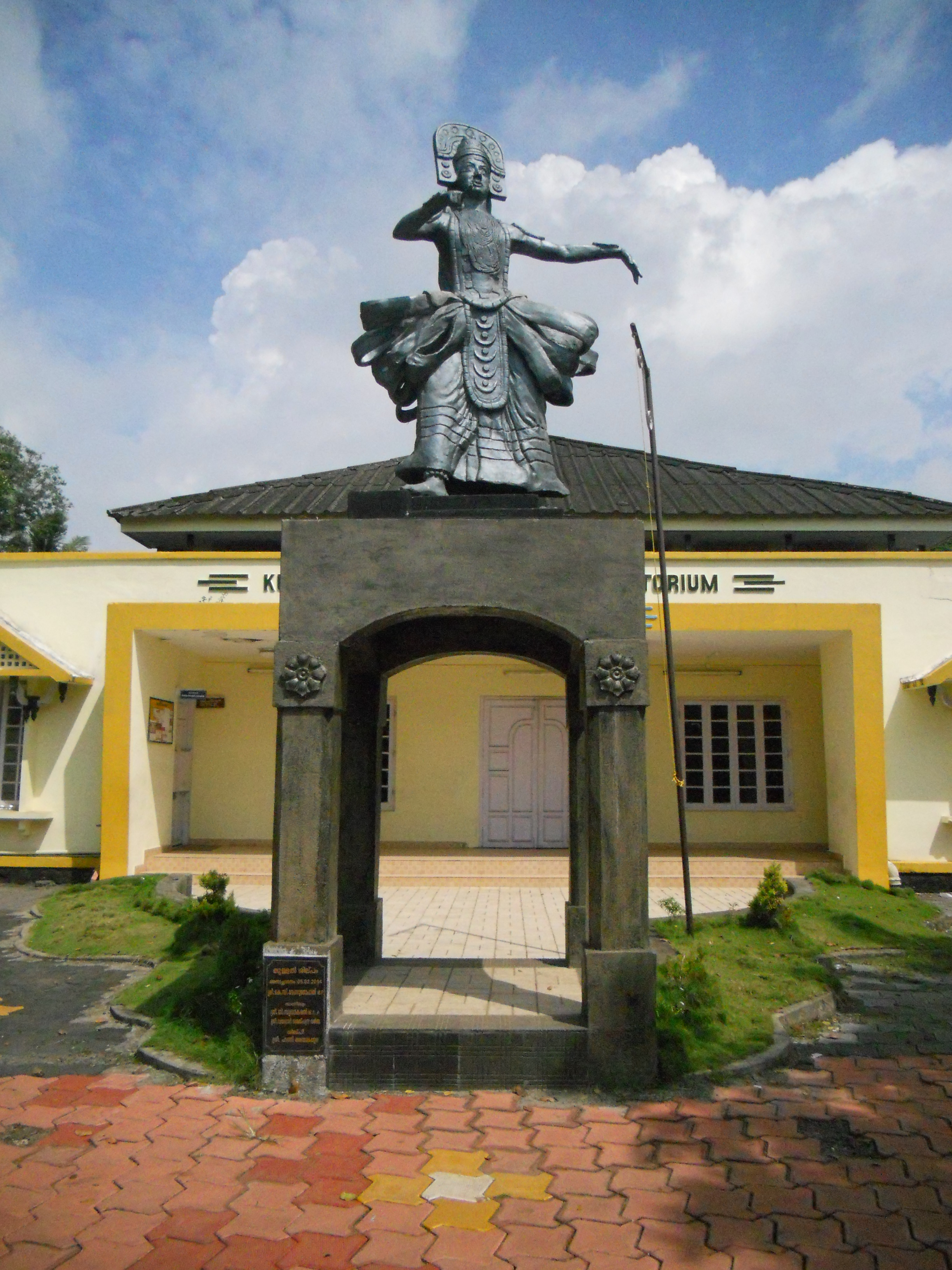 അമ്പലപ്പുഴയിലെ കുഞ്ചന്‍ നമ്പ്യാര്‍ സ്മാരകത്തിലെ പ്രതിമ